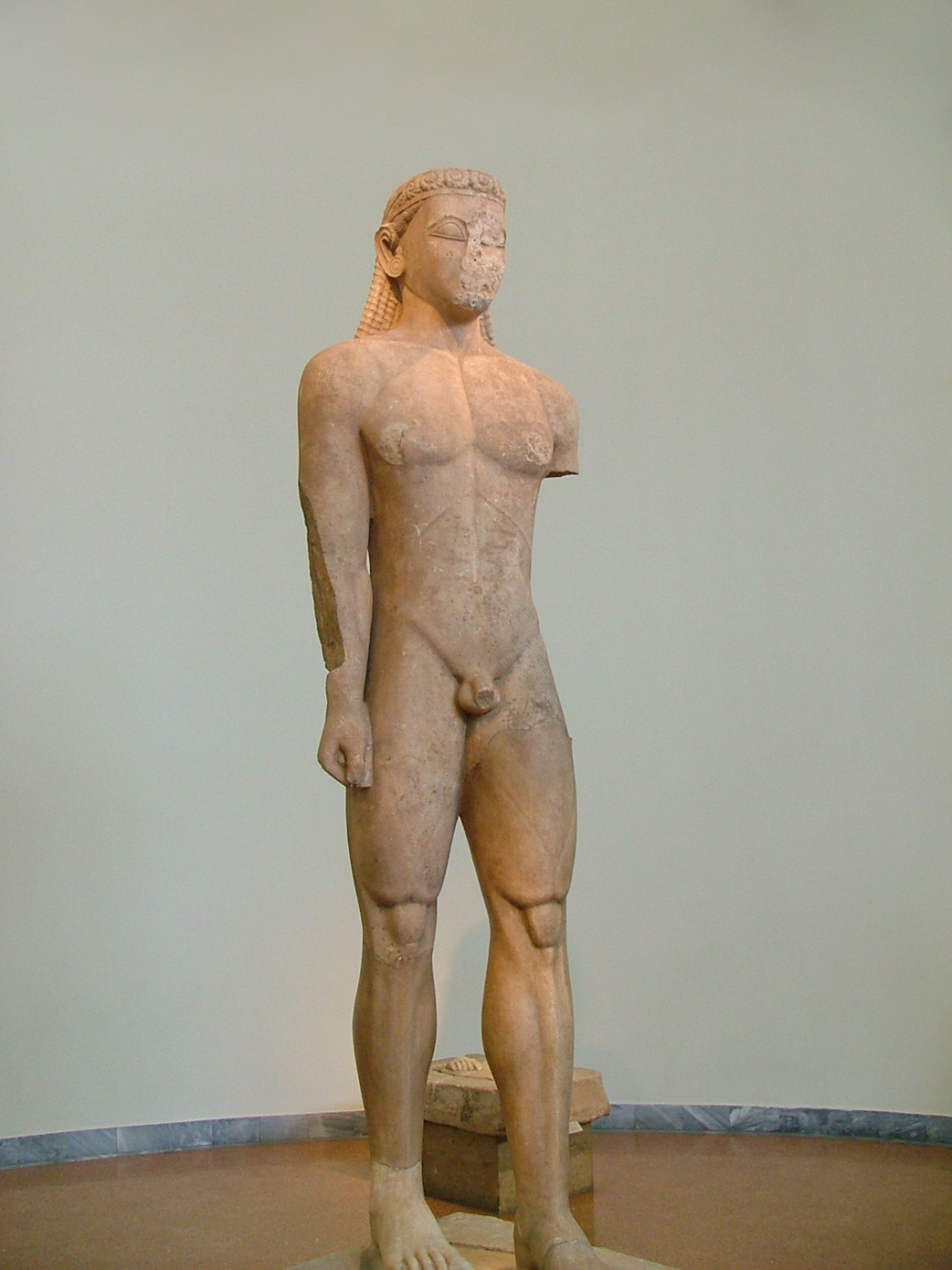 Estatua de un kouros encontrada en Sunión. La estatua fue una ofrenda votiva ofrecida al dios Poseidón. Mármol de Naxos. Circa 600 a. C..